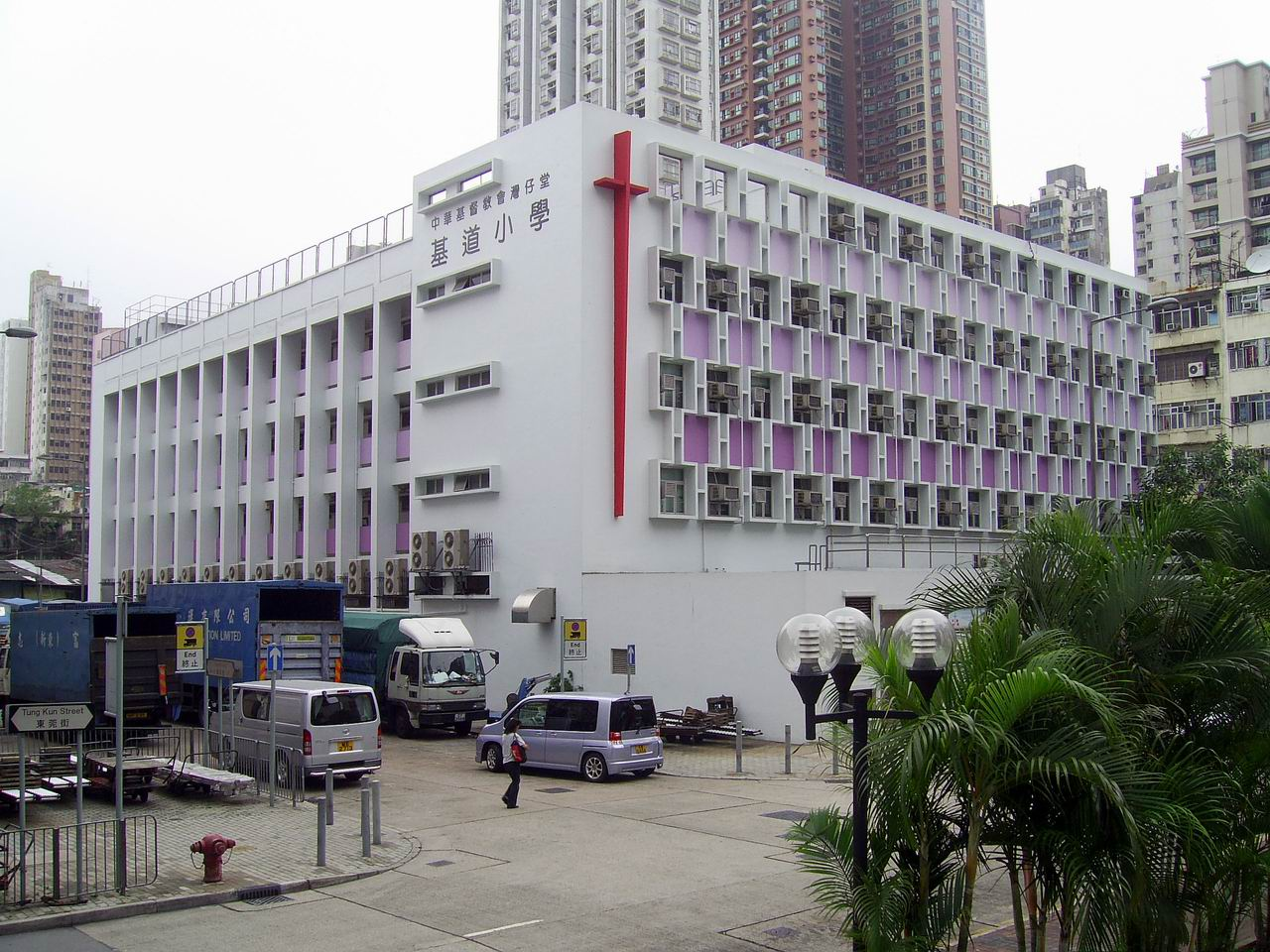 油麻地灣仔堂基道學校